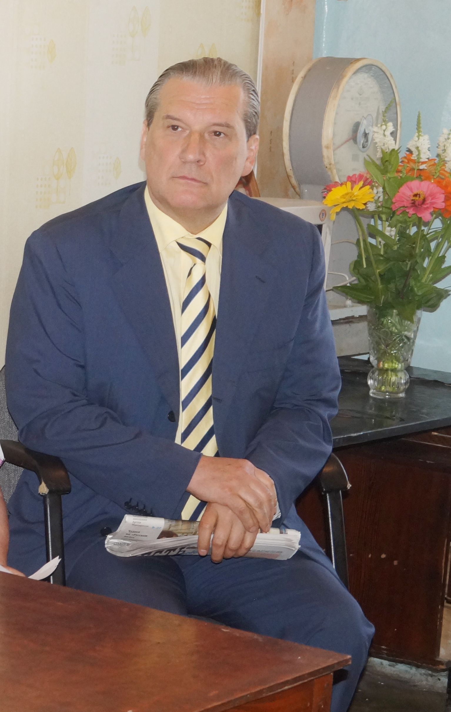 А. И. Александров на встрече с избирателями